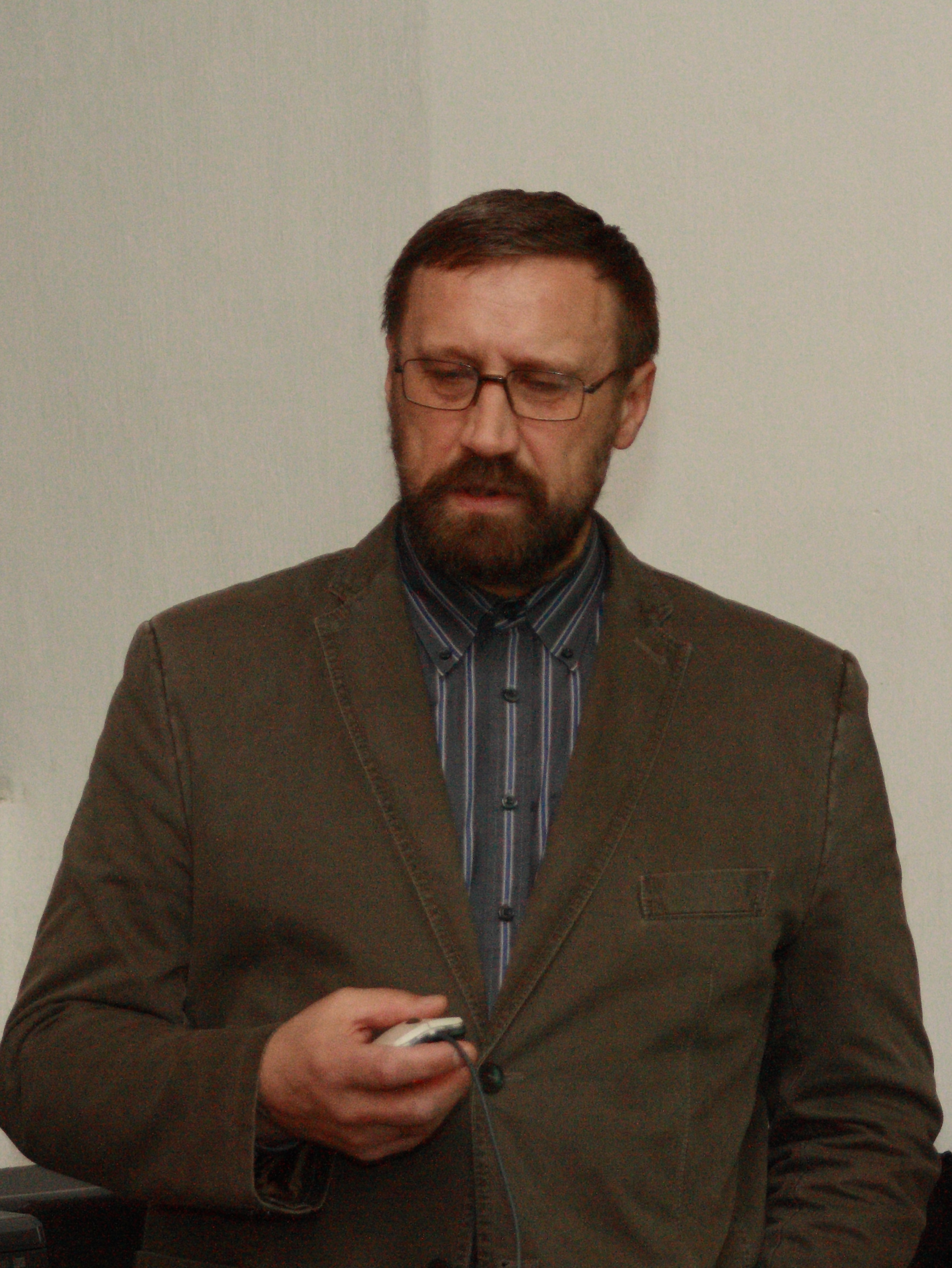 Raivo Mänd pidamas ettekannet "Ökolőksud ja atraktiivsed mülkad" Saaremaa Muuseumis